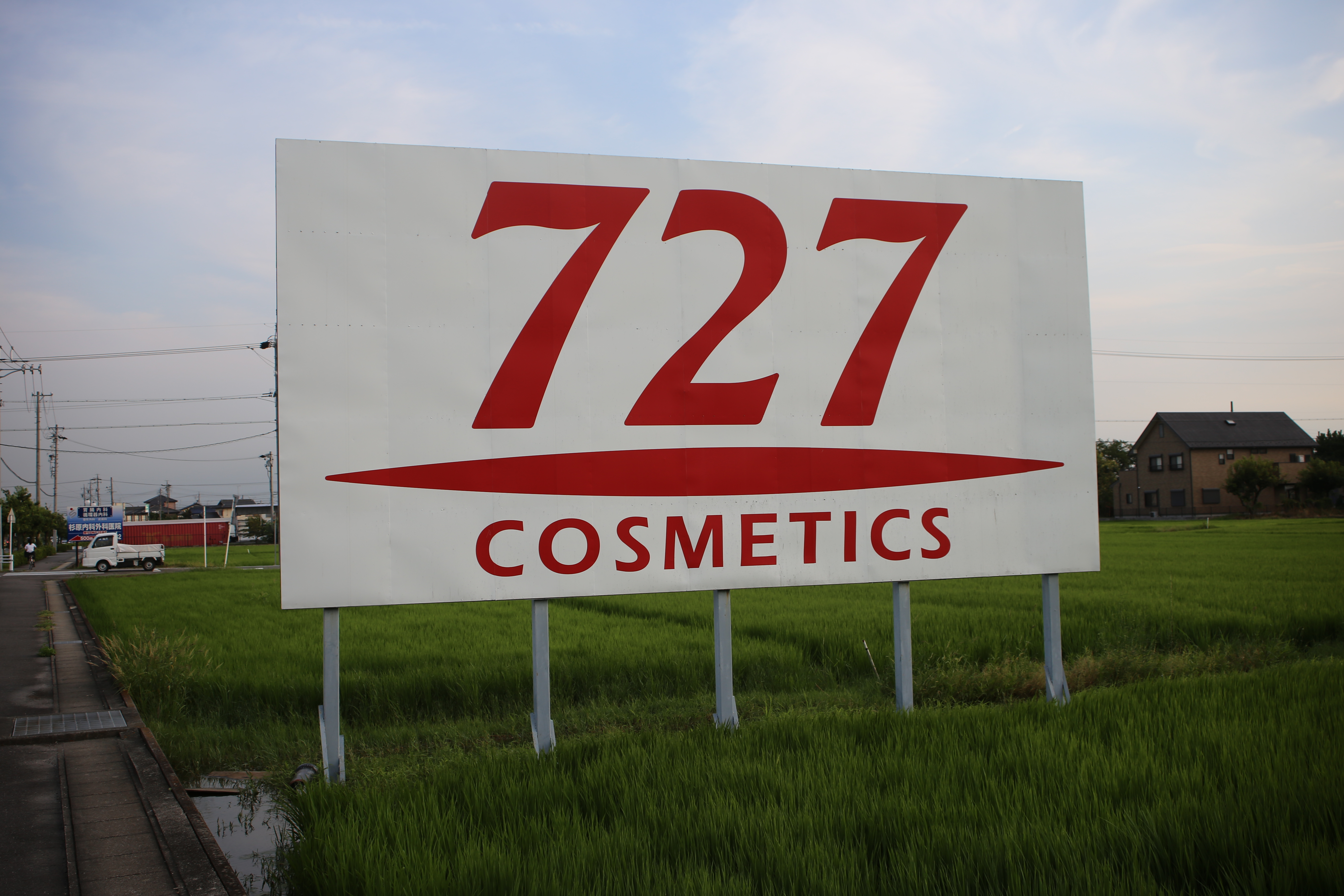 愛知県稲沢市内に設置された「727化粧品」の看板